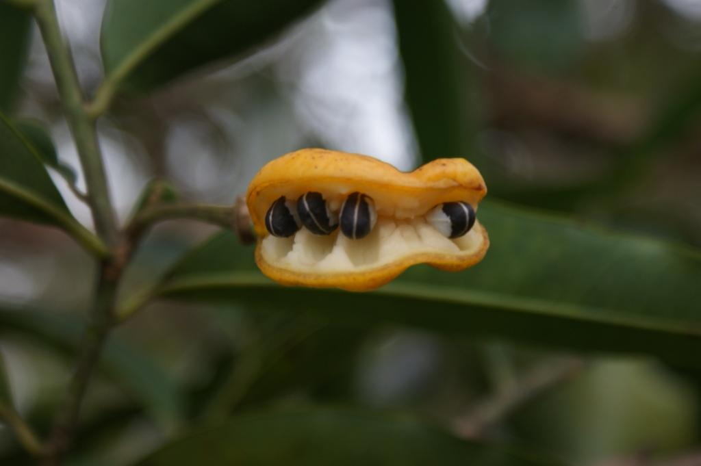 Cardiopetalum calophyllum - ANNONACEAE Parque Estadual da Serra dos Pirineus - Pirenópolis - Goiás - Brasil.